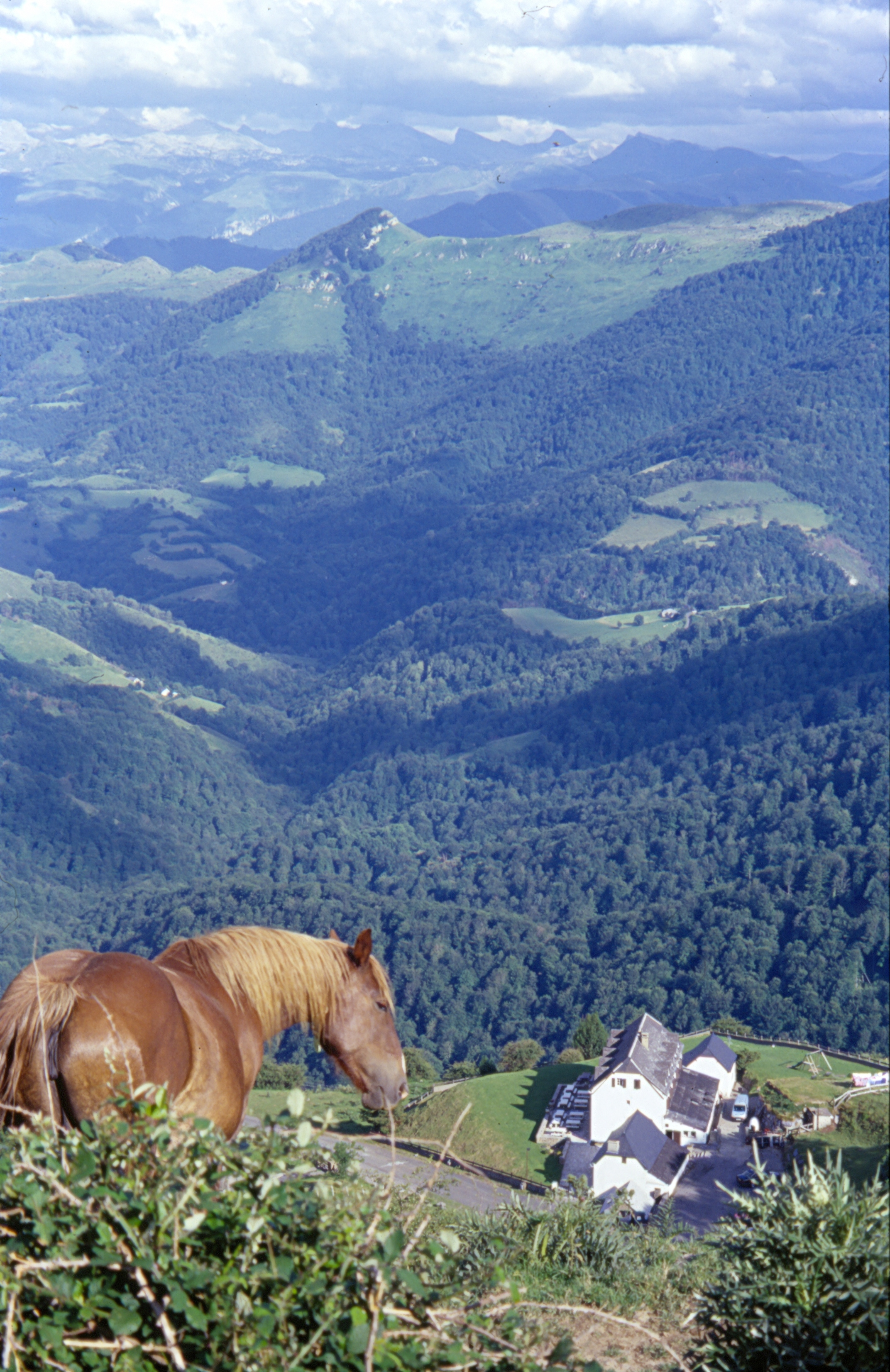 Ahüzkiko bainuetxea 2003an, Bohorkortia menditik ikusia.